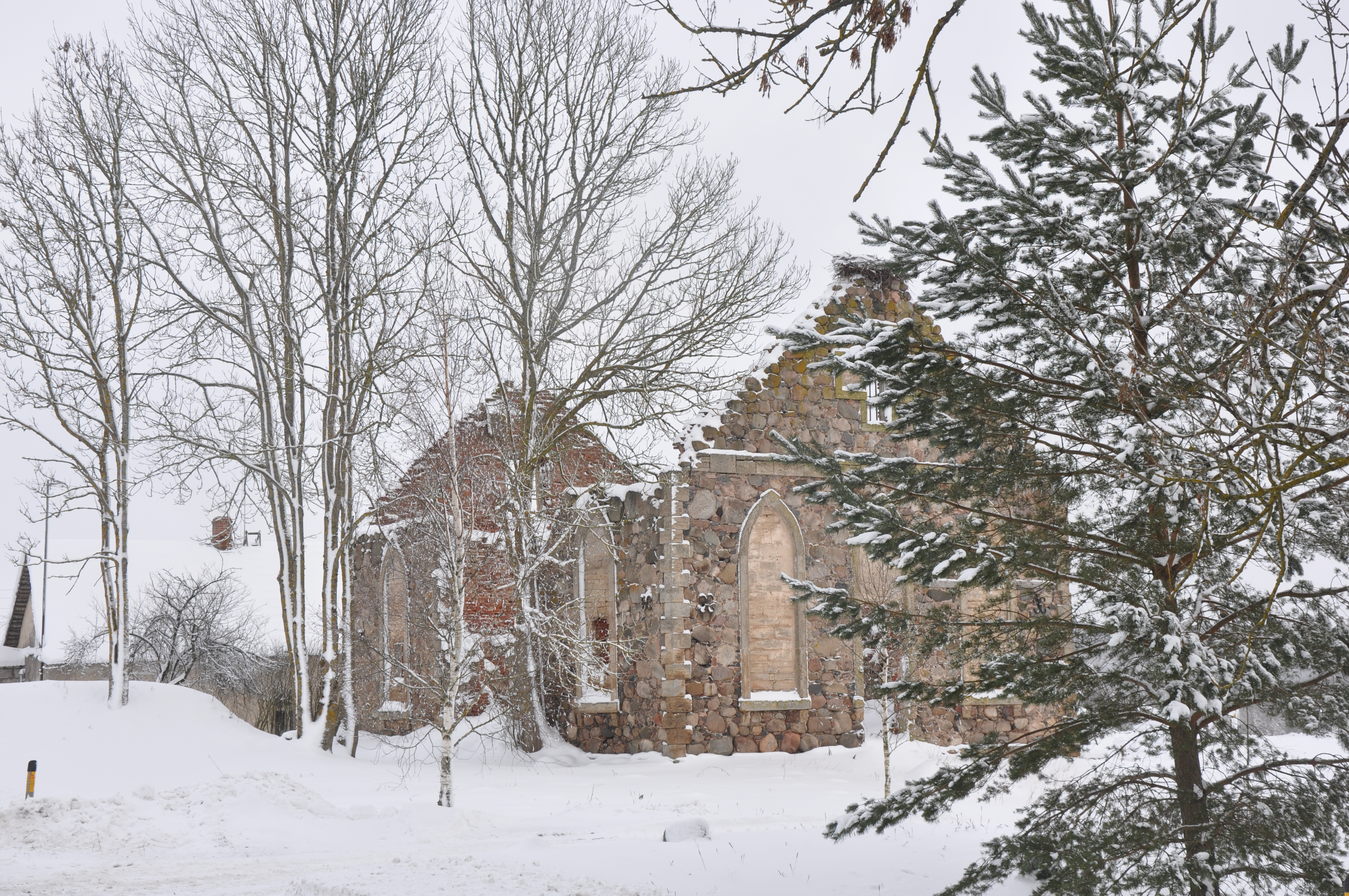 Allažmuižas baznīcas drupas, Allažu pagasts, Siguldas novads, Latvia